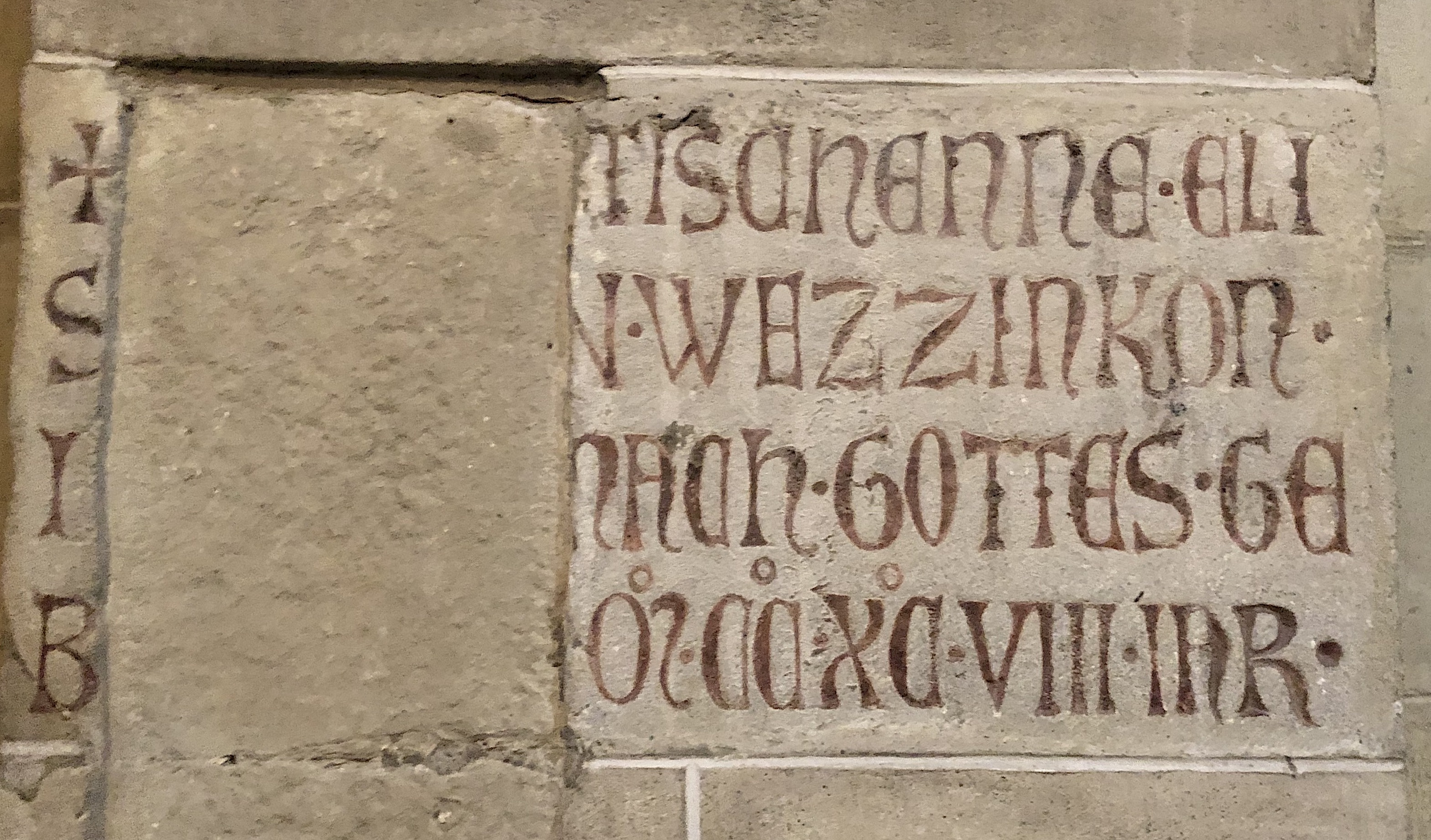 Inschrift betr. Elisabeth von Wetzikon